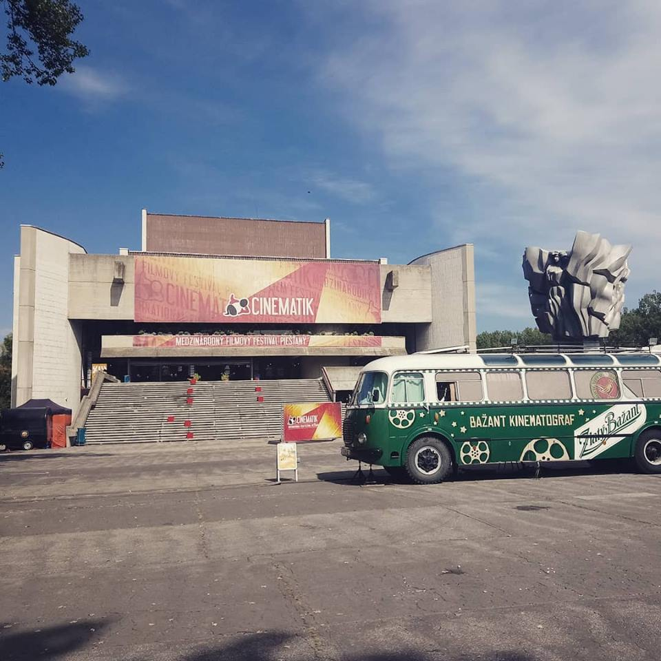 Dom umenia v Piešťanoch počas 13. ročníka filmového festivalu Cinematik 2018. V popredí autobus Bažant Kinematograf.